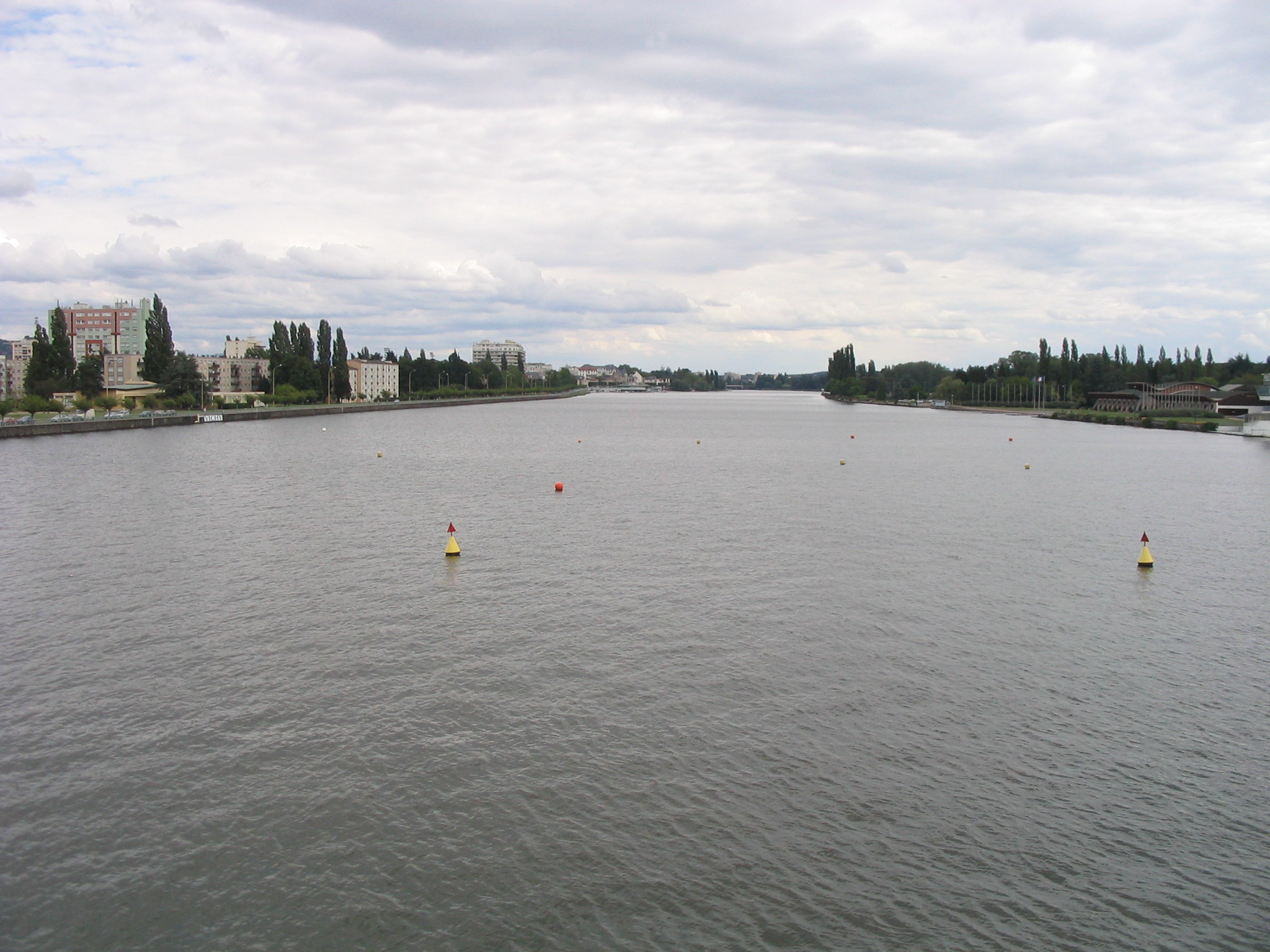 L'Allier pris depuis le pont de l'Europe, à Vichy et Bellerive-sur-Allier(France). Rive droite:Bellerive-sur-Allier. Rive gauche:Vichy.